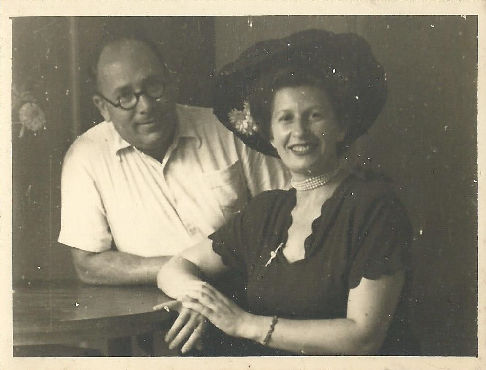 שמואל ואלה רעיוני 1955